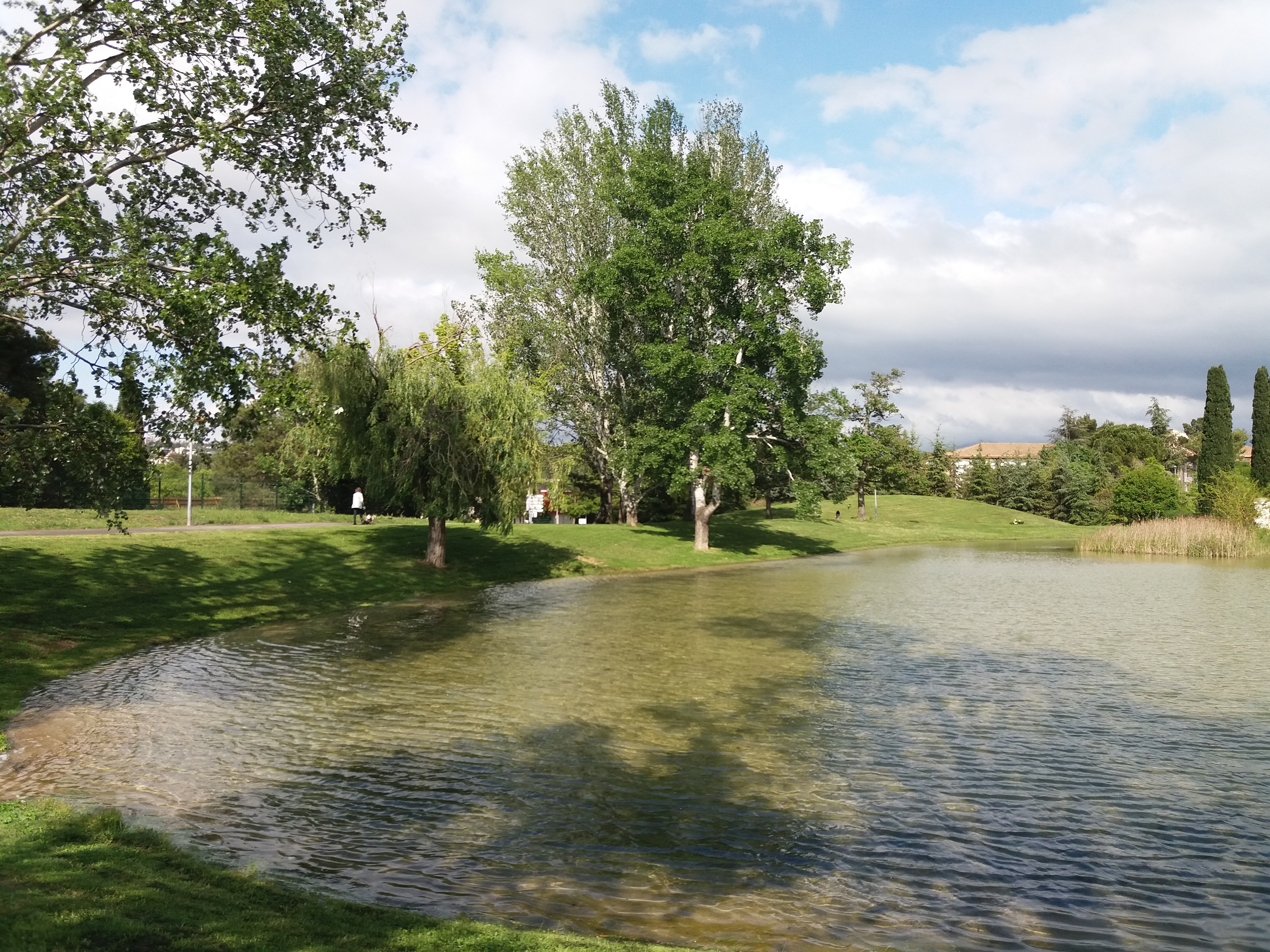 Parc Gilbert Vilers - Théâtre de verdure à Aix-en-Provence (France)